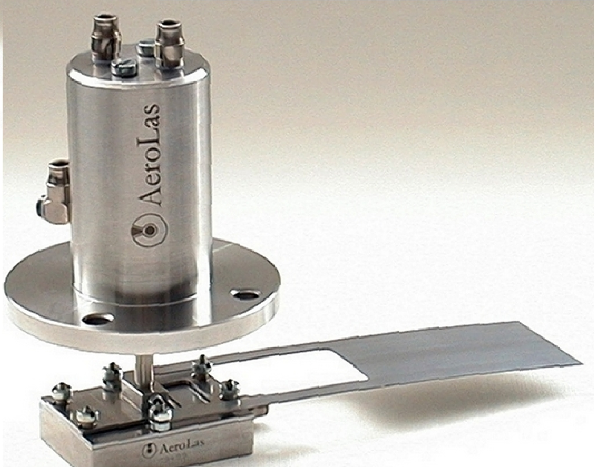 Luftlager mit Kolbenaktor